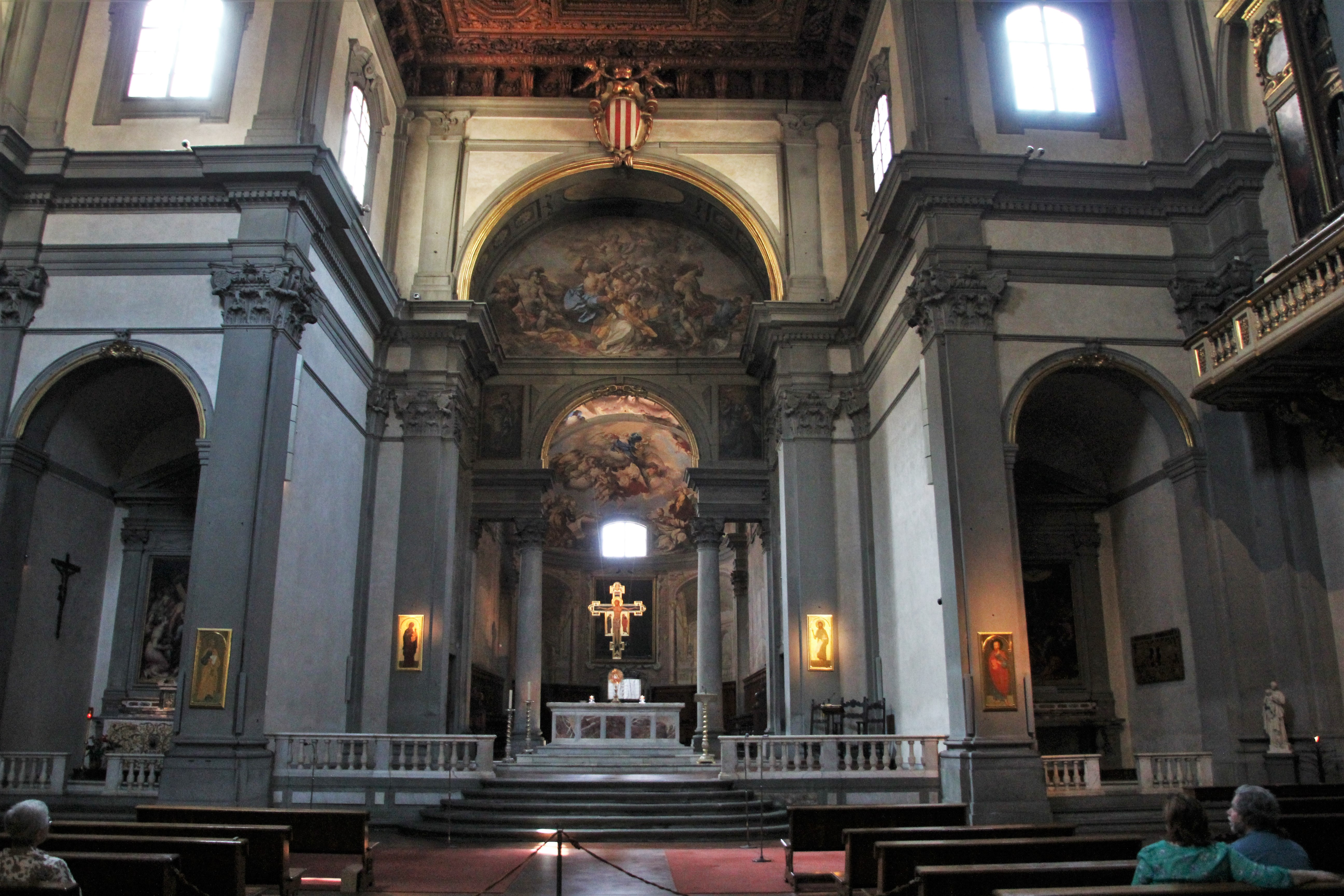 Firenze, Badia Fiorentina